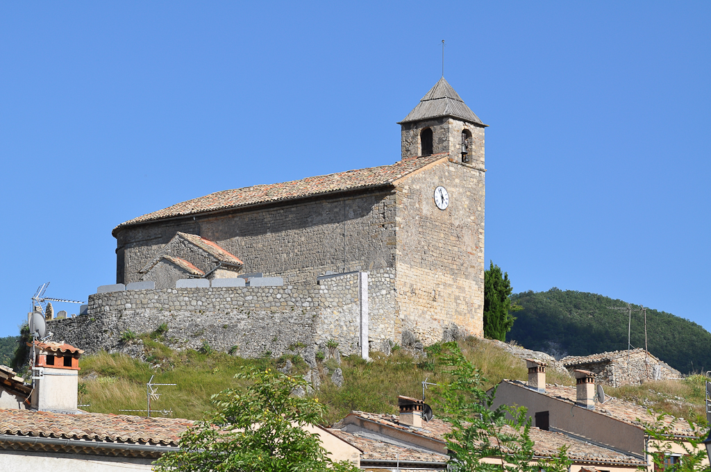 Castellet-lès-Sausses, église paroissiale